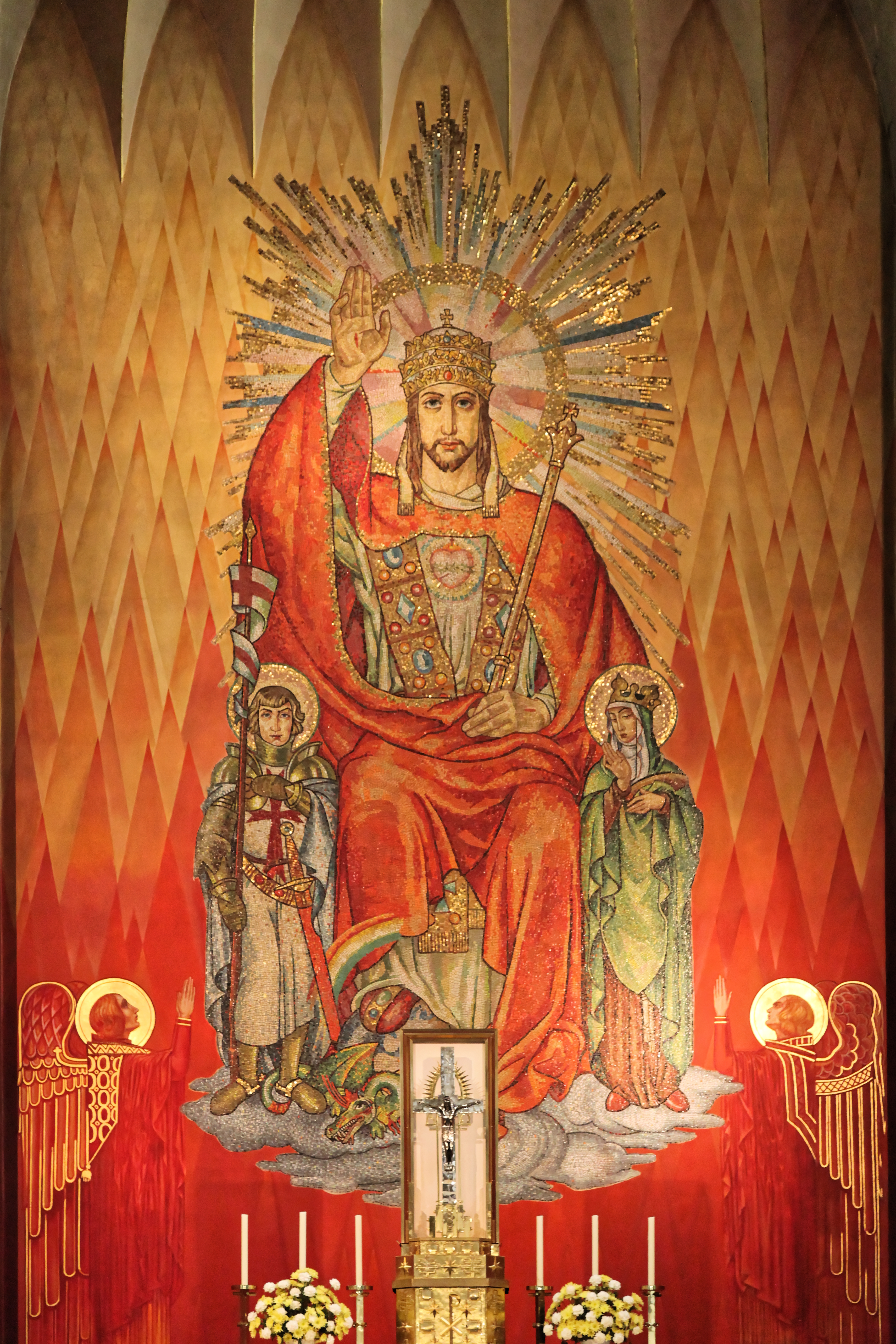 Christus-König-Kirche, Kloster Thuine, Klosterstraße in Thuine